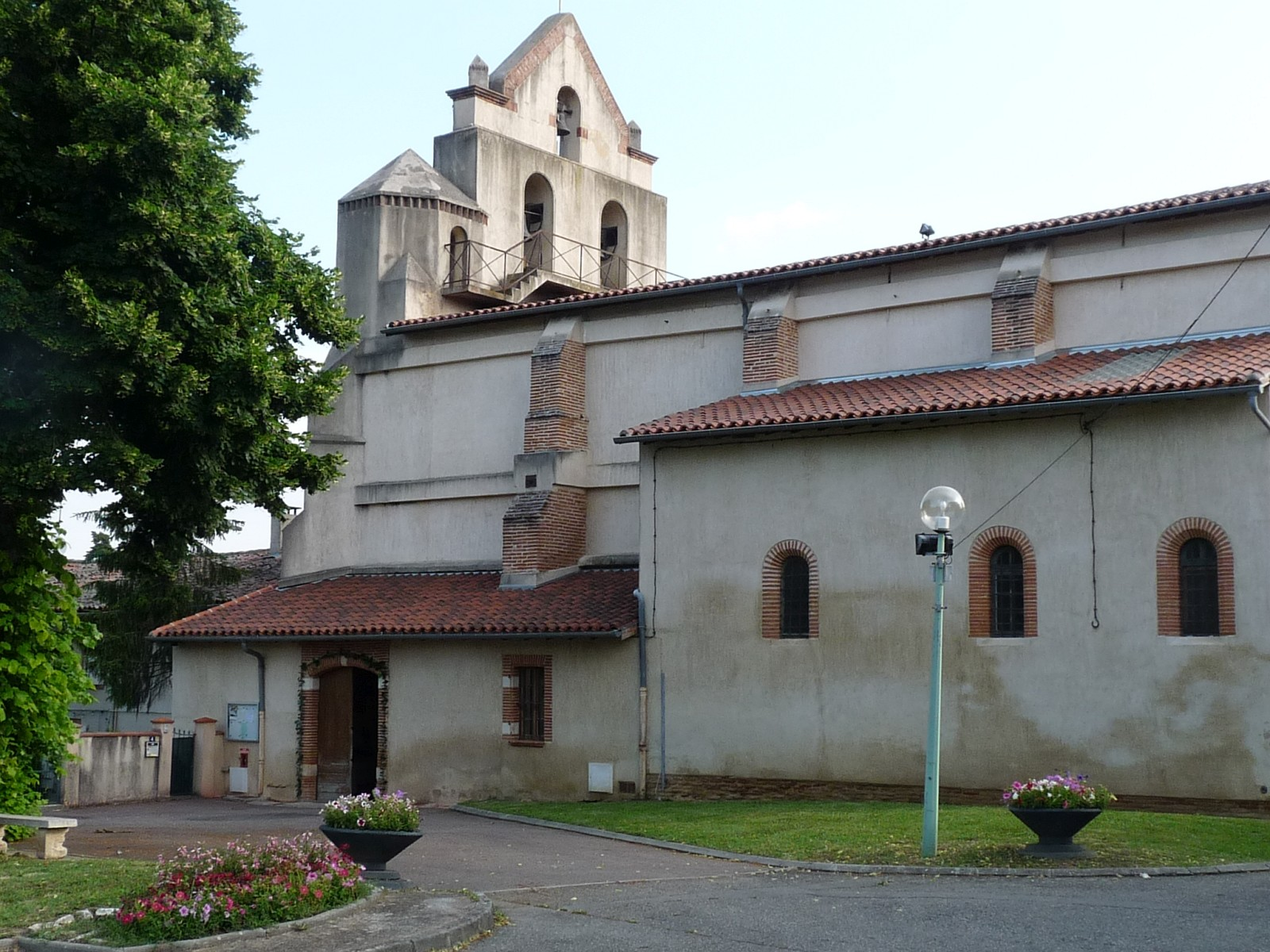 Eglise de Flourens, Haute-Garonne, France